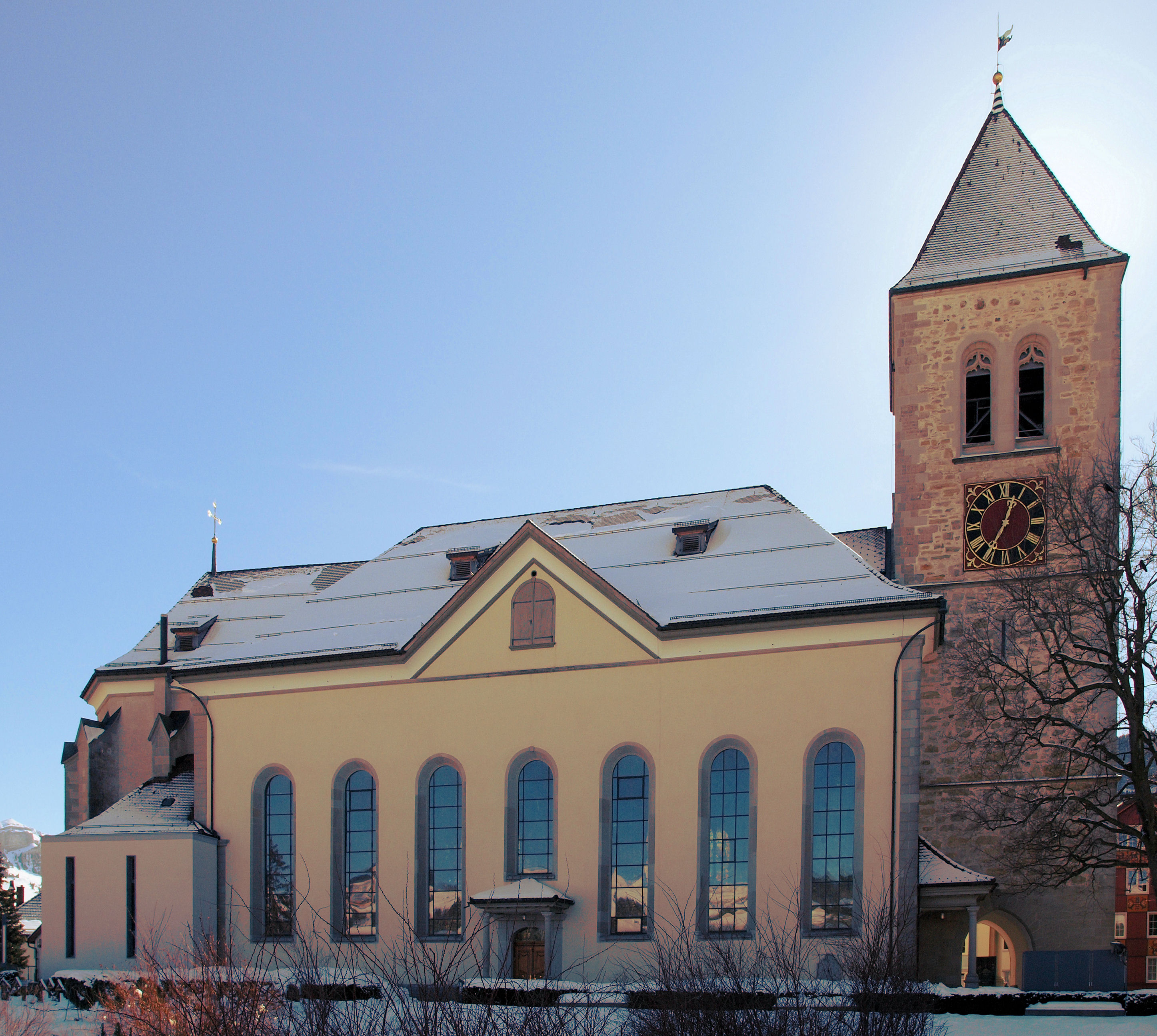 Die Pfarrkirche St. Mauritius in Appenzell. Ansicht von Norden (Friedhof).